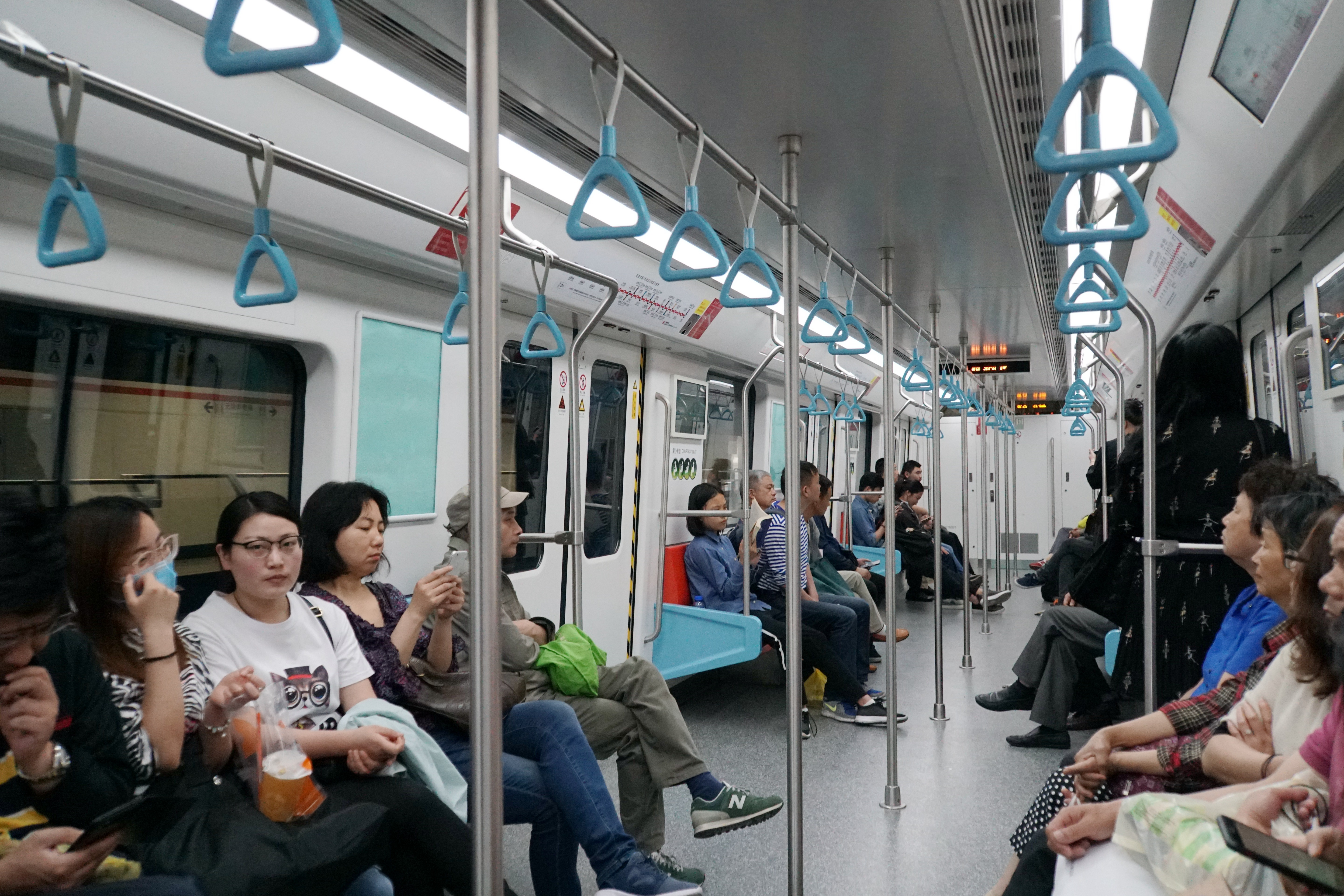 01A06型列车内部